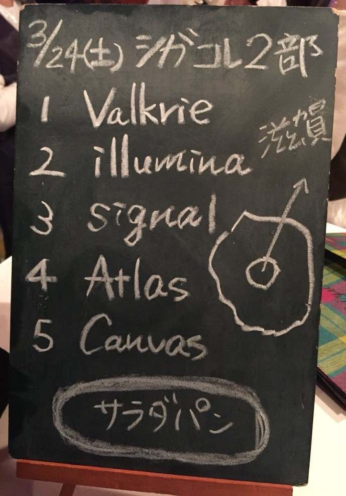 amiinAセトリボード(20180324(2))